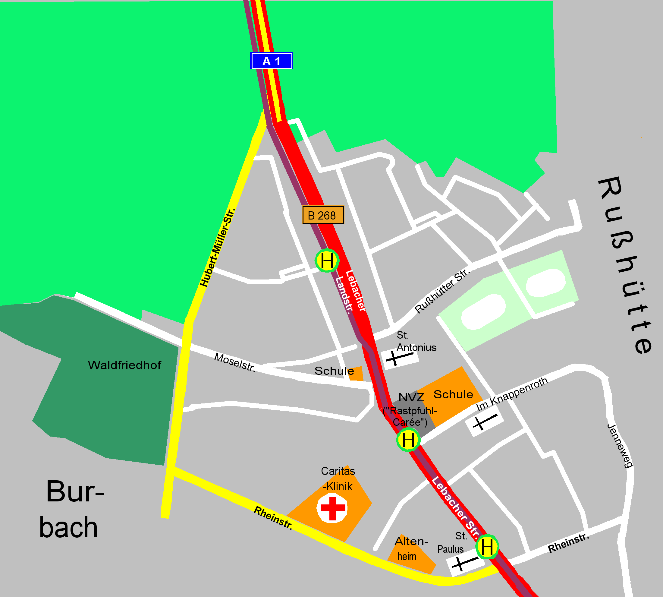 Karte vom Rastpfuhl (Distrikt der Stadt Saarbrücken)